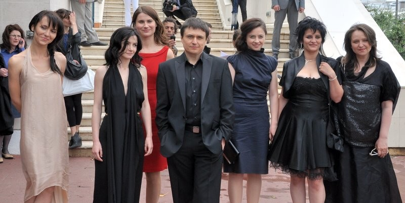 Le réalisateur et les actrices de Au-delà des collines au festival de Cannes